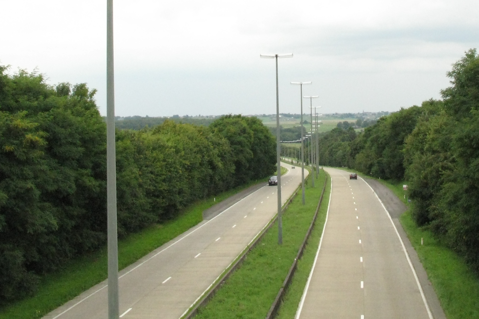 La Nationale 63 vu du pont de Maffe (échangeur N 983), en direction Liège